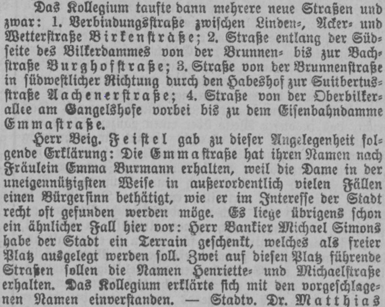 Bürgerzeitung Düsseldorf 1895 - Sitzung der Stadtverordneten vom 22. Oktober.